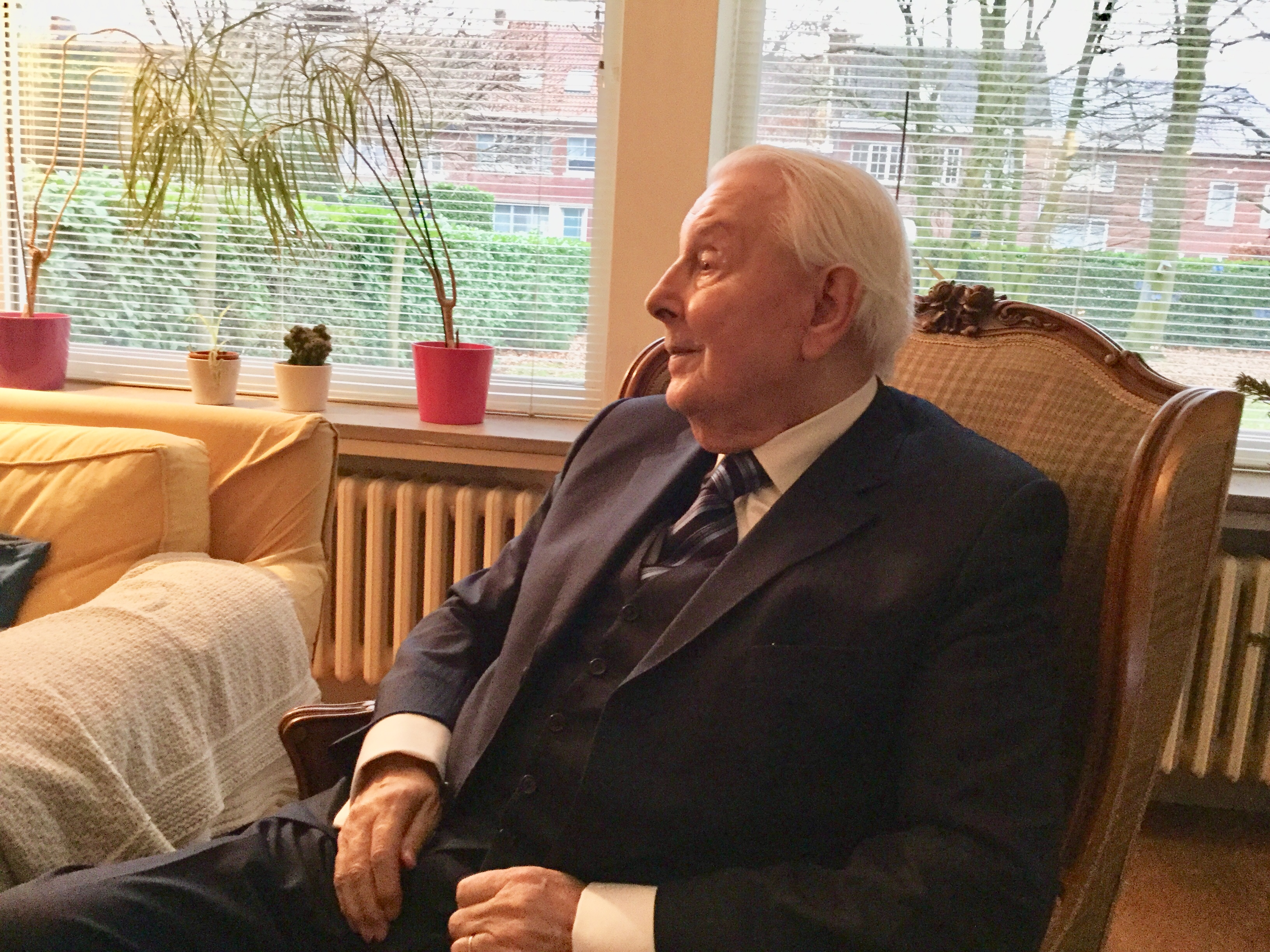 Robert Baron Stouthuysen